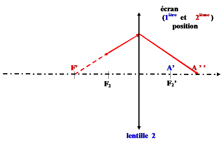 Explication sur la méthode focométrique de Badal